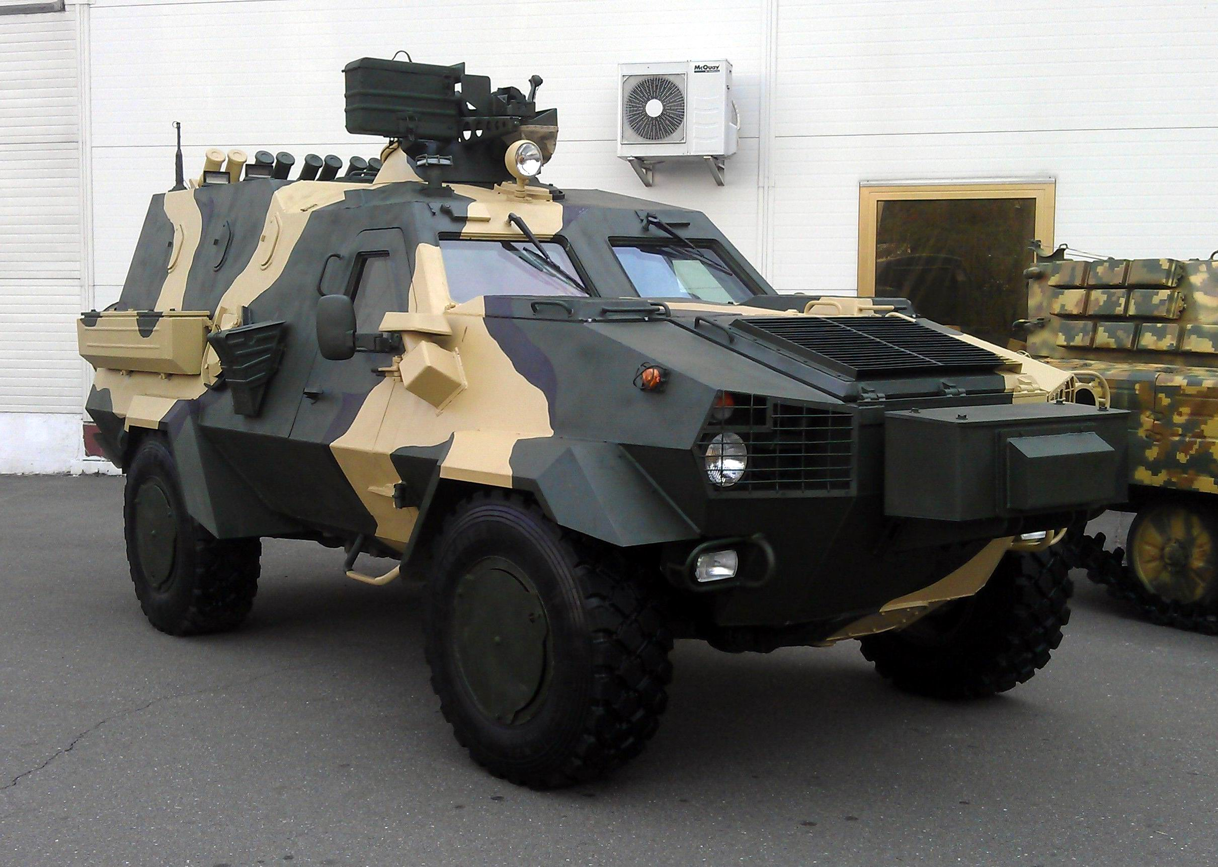 Бронетранспортер "Дозор-Б" в экспозиции Львовского бронетанкового завода. Выставка "Зброя та безпека", Киев, сентябрь 2015 г.